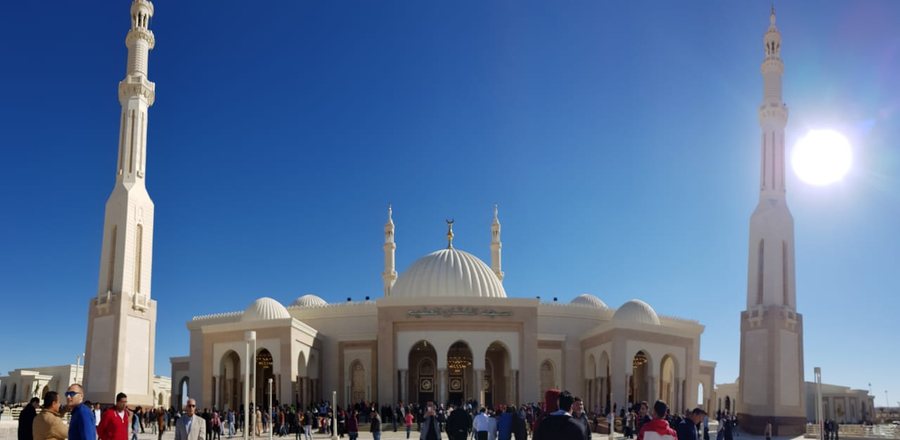 البوابة الرئيسية - مسجد الفتاح العليم - العاصمة الادارية الجديدة